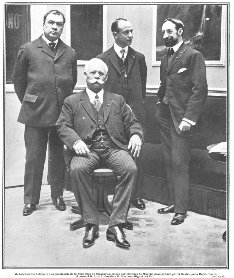 D. Jose SAntos Zelaya (X), ex presidente de la República de Nicaragua, en sus habitaciones de Madrid, acompañado por el ilustre poeta Rubén Darío el coronel, D. Luis A. Cousin y D. Mariano Miguel del Val. Fot. Goñi